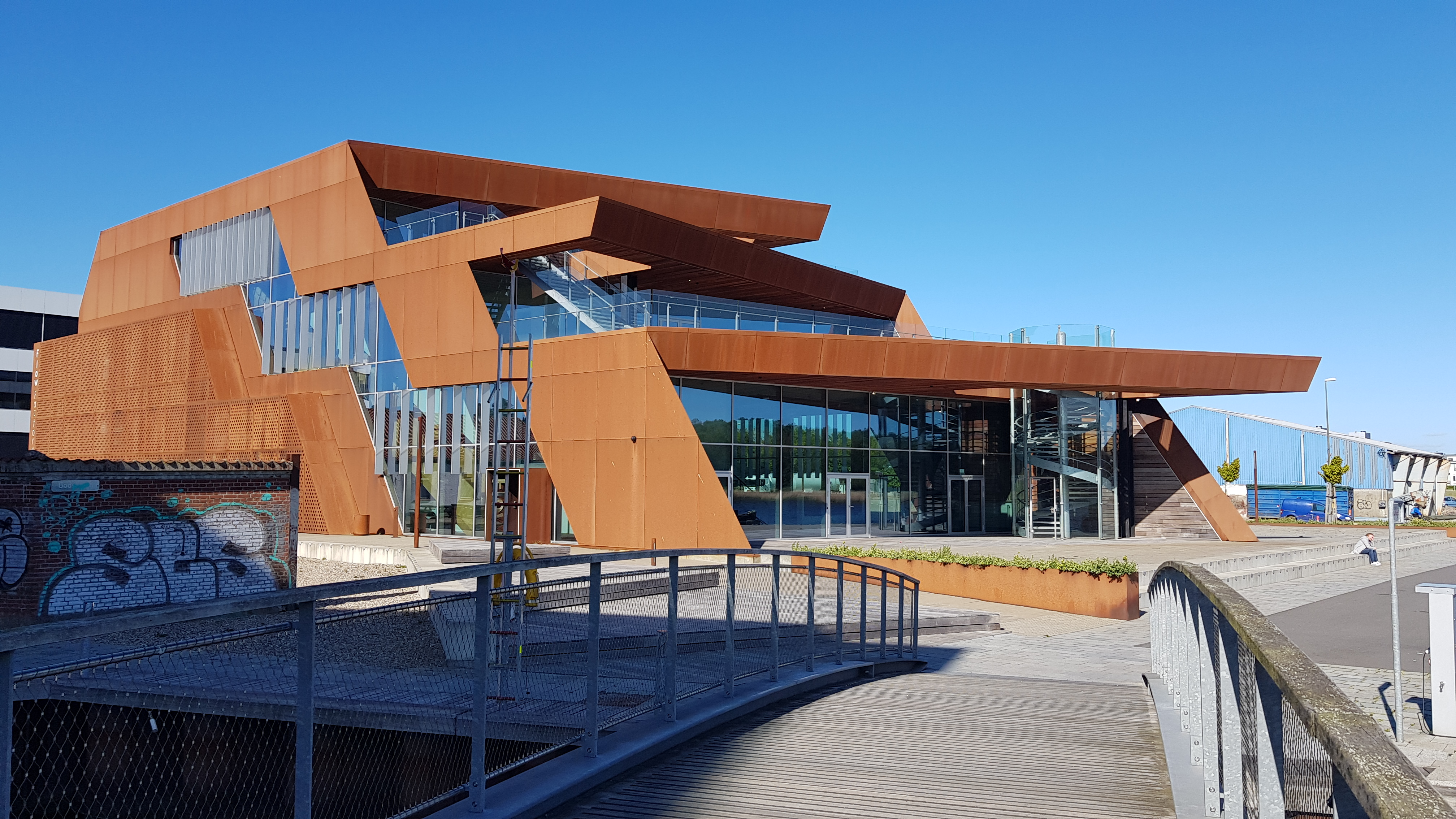 FlowFactory på Kulkajen i Haderslev